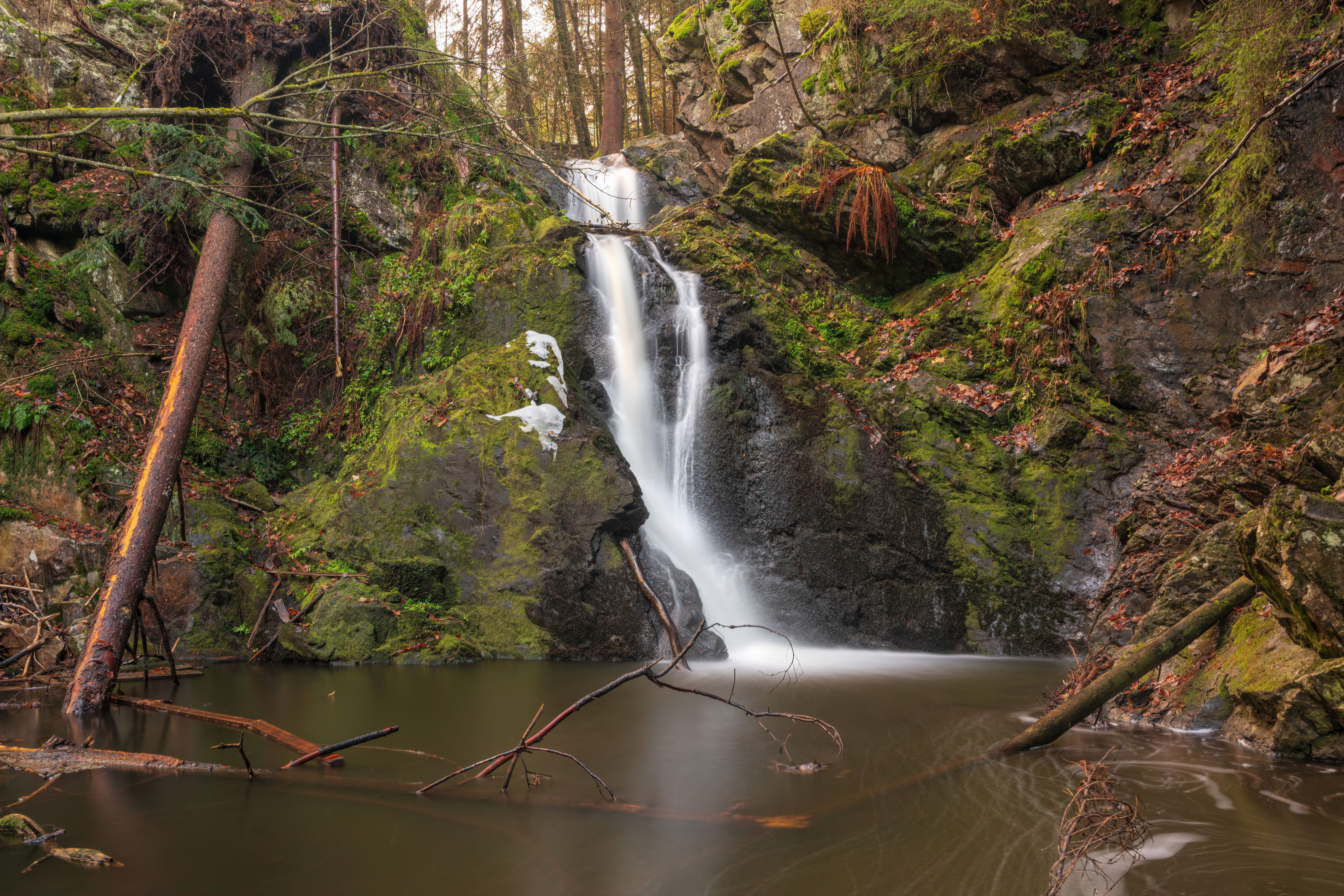 Falkauer Wasserfall, zwei Fallstufen, 8m